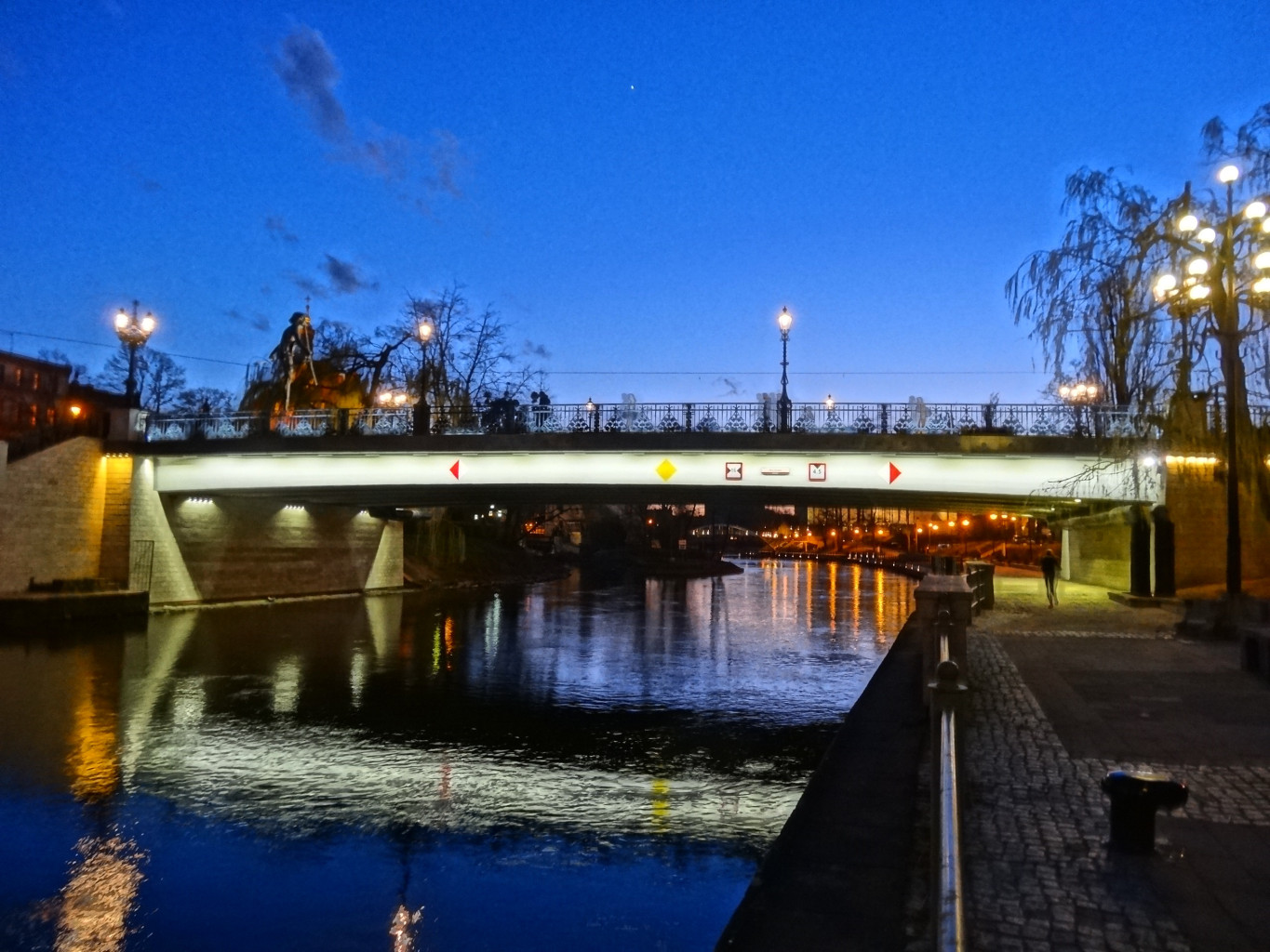 Most Staromiejski im. Jerzego Sulimy-Kamińskiego nad Brdą w Bydgoszczy